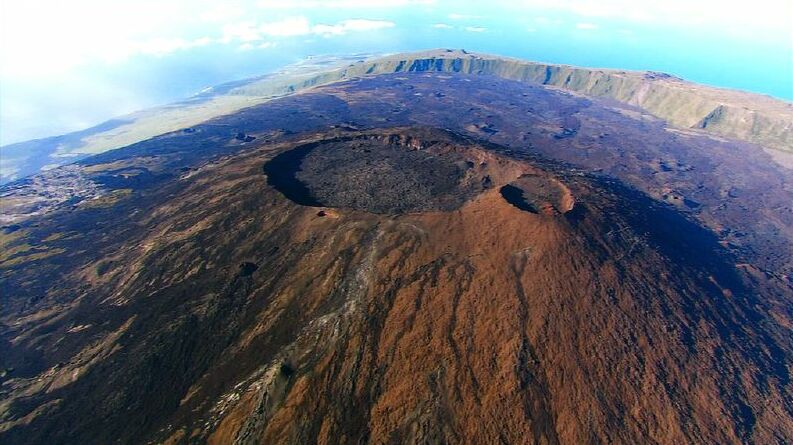 Les deux cratères sommitaux du Piton de la Fournaise